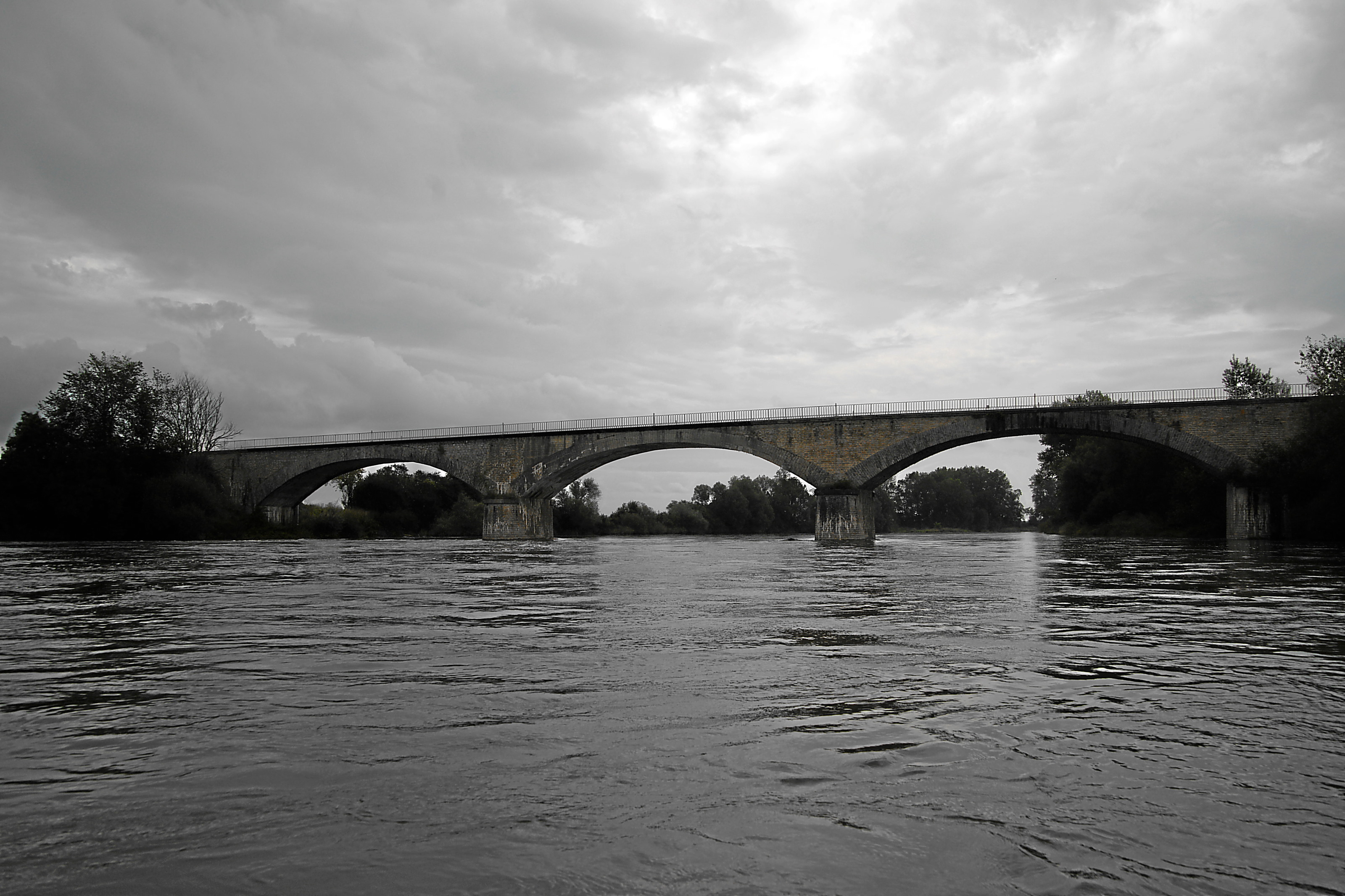 Loire: Brücke der D30 bei Gannay-sur-Loire